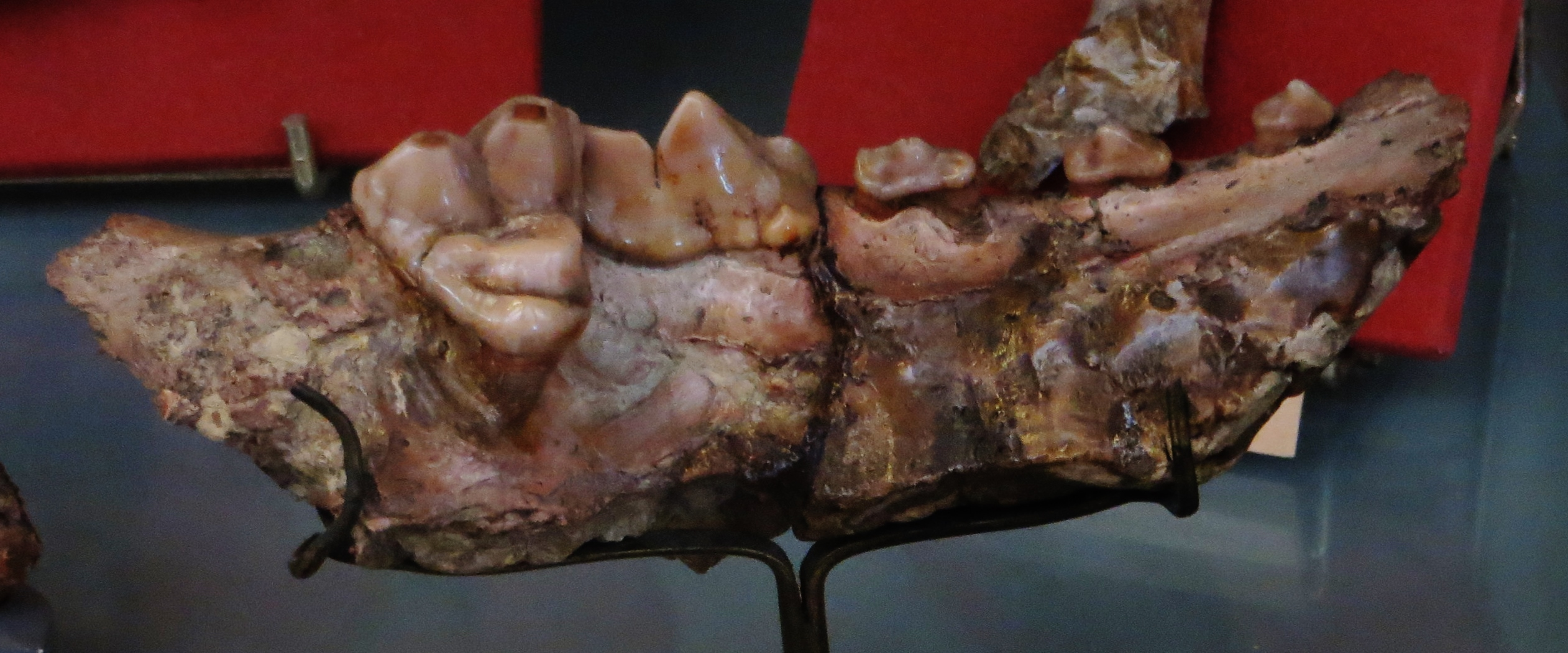 Fossil of Amphicyon, an extinct mammal - Took the photo at Museum Histoire Naturelle, Paris